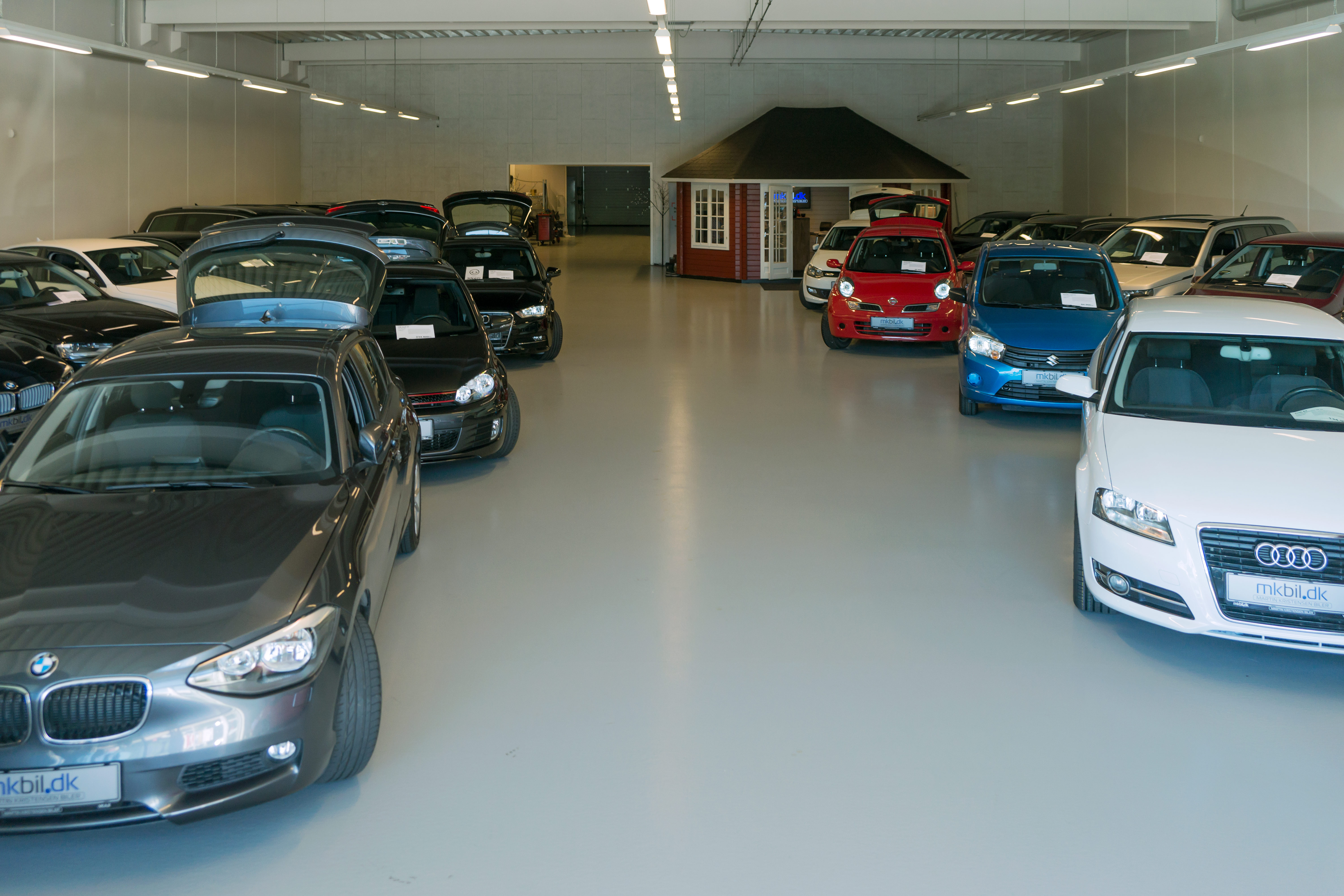 Brugtbilforhandlere er ikke låst til et bestemt mærke - her er det fx Martin Kristensen biler i Vejle, der har specialiseret sig i brugte kvalitetsbiler som fx Audi, BMW, Mercedes og VW.